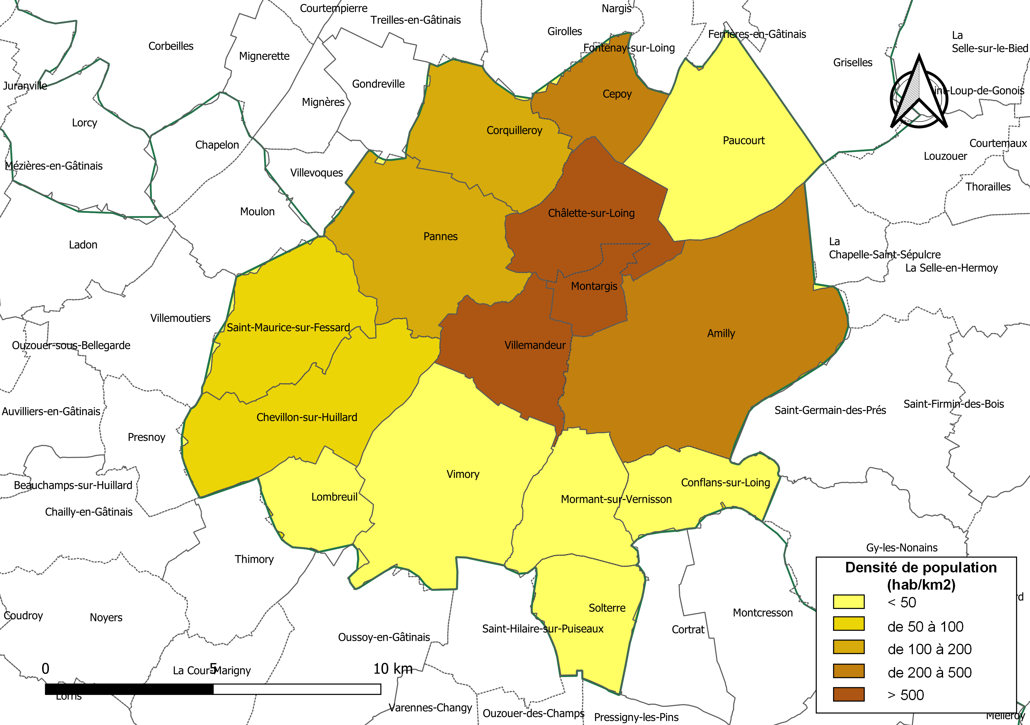 Carte des densités de population (millésimée 2016) des communes de la communauté de communes l'intercommunalité Agglomération montargoise et rives du Loing, département du Loiret, France. Composition au 1er janvier 2019.